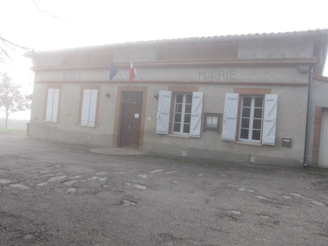 Mairie de Préserville